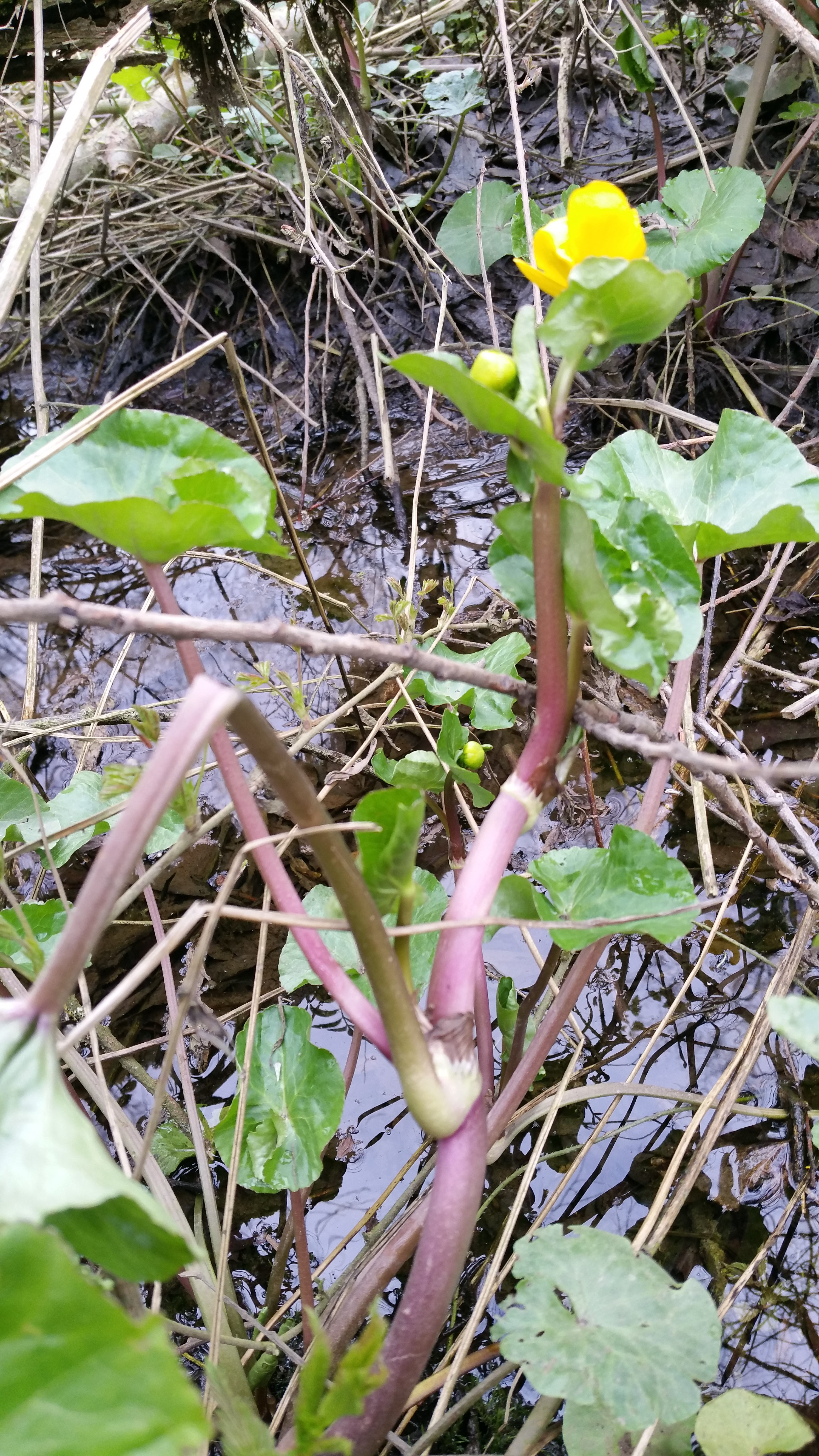 voorjaar 2019